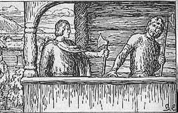 Halfdan Egedius: Illustration for Magnus den godes saga. Snorre 1899-edition. «Tag heller min Øx.» nb: «Ta heller mi øks.» nn: «Ta heller øksa mi.»